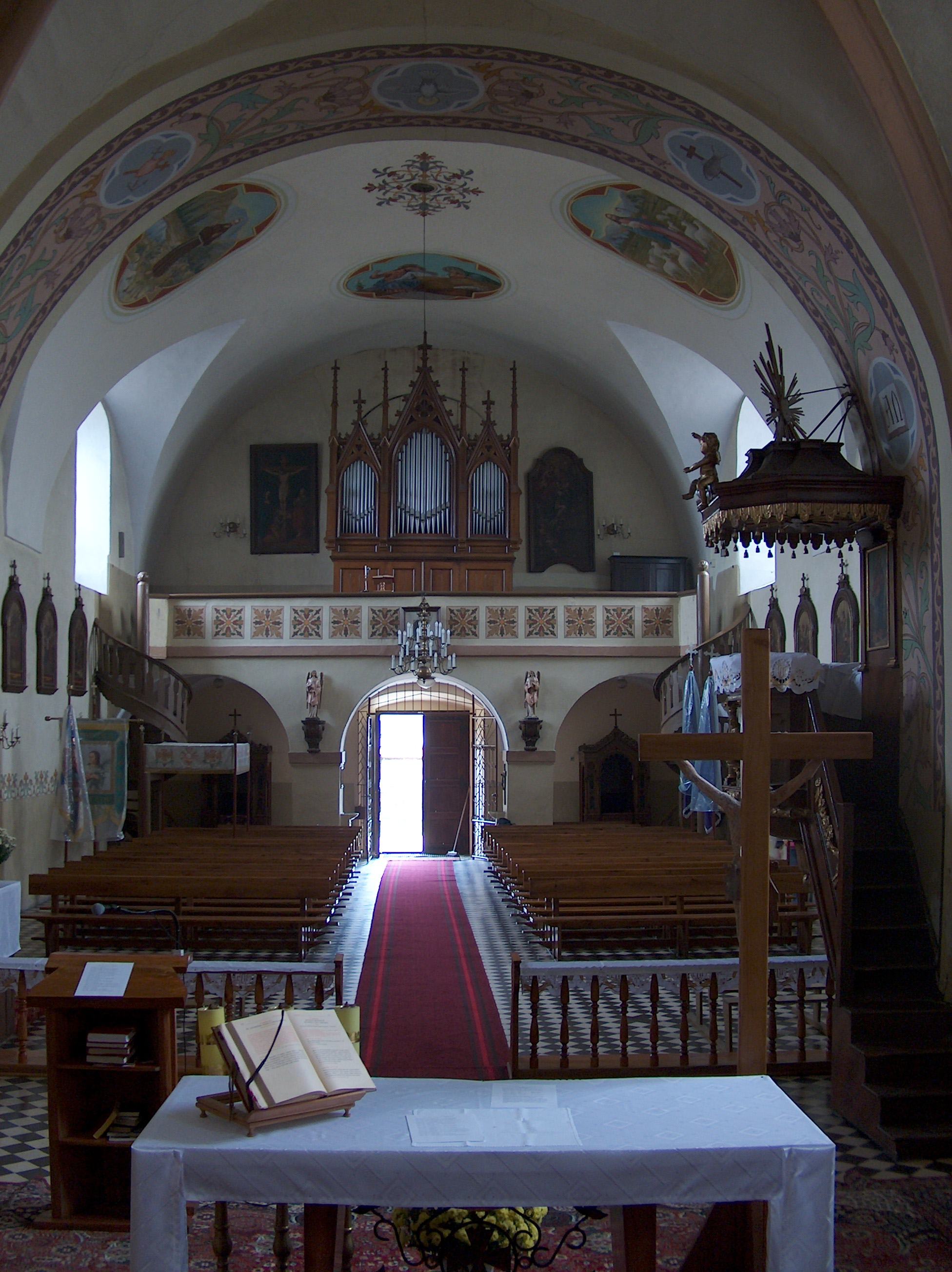 Nawa główna od strony prezbiterium przed remontem